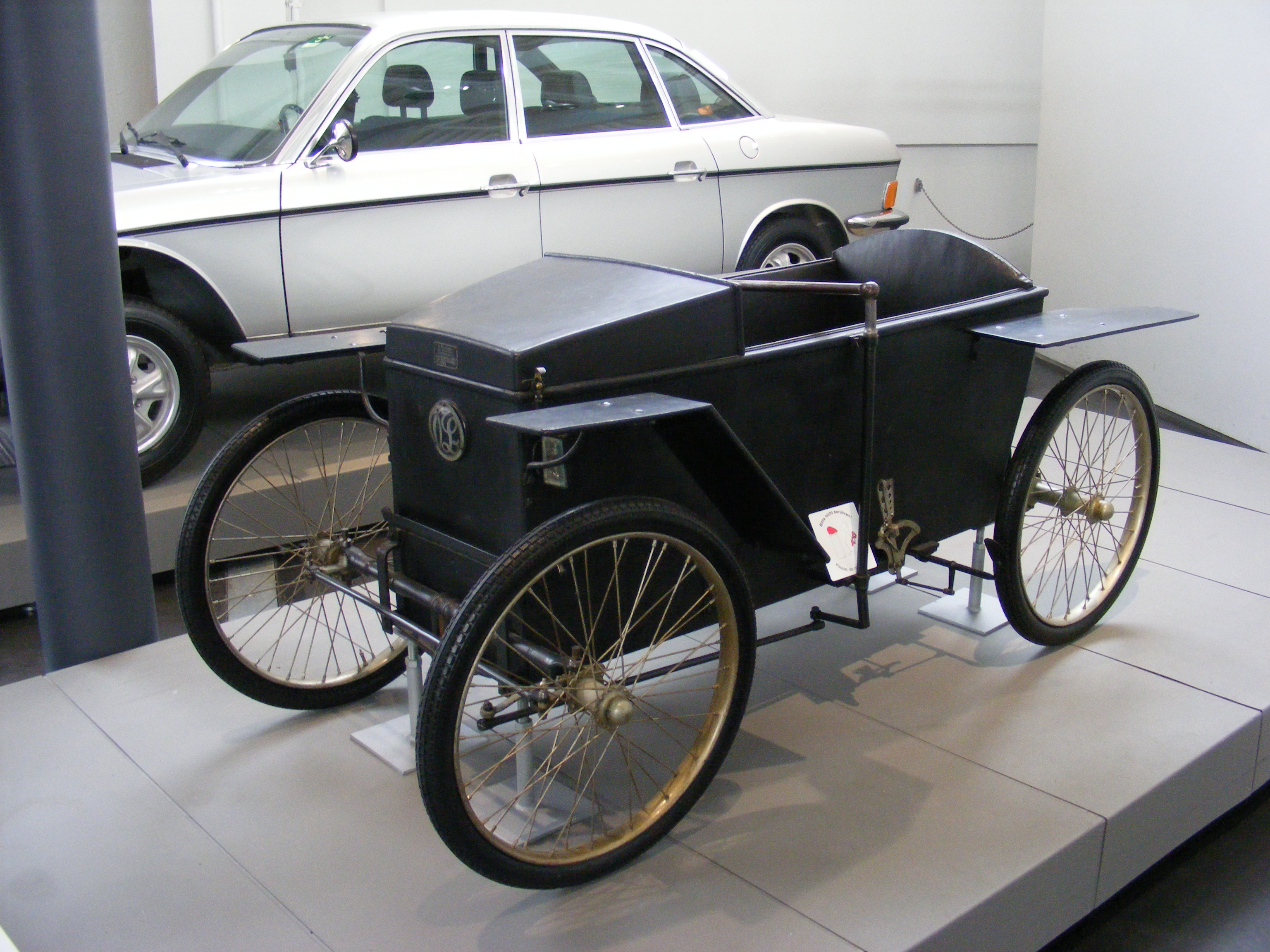 Slaby-Beringer Elektrowagen (Nr. 141), einsitzig, Bj. 1920, Hersteller: SB Automobil-Gesellschaft m.b.H., Abt. Kleinautobau, Charlottenburg — Deutsches Museum Verkehrszentrum München (Halle I), Inv.-Nr. 68770.